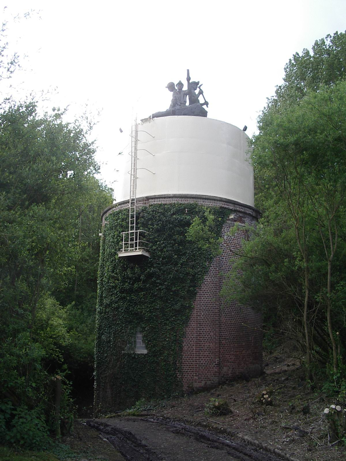 La stèle du mineur édifiée à l'endroit précis où fut forée la fosse n°1 (1855).